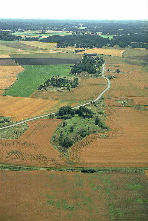 Gravfält i bildens mitt. Motiv: Skamby Nyckelord: Flygbilder, Riksintressen Kategori: Miljöer, OdlingslandskapGravfält i bildens mitt.